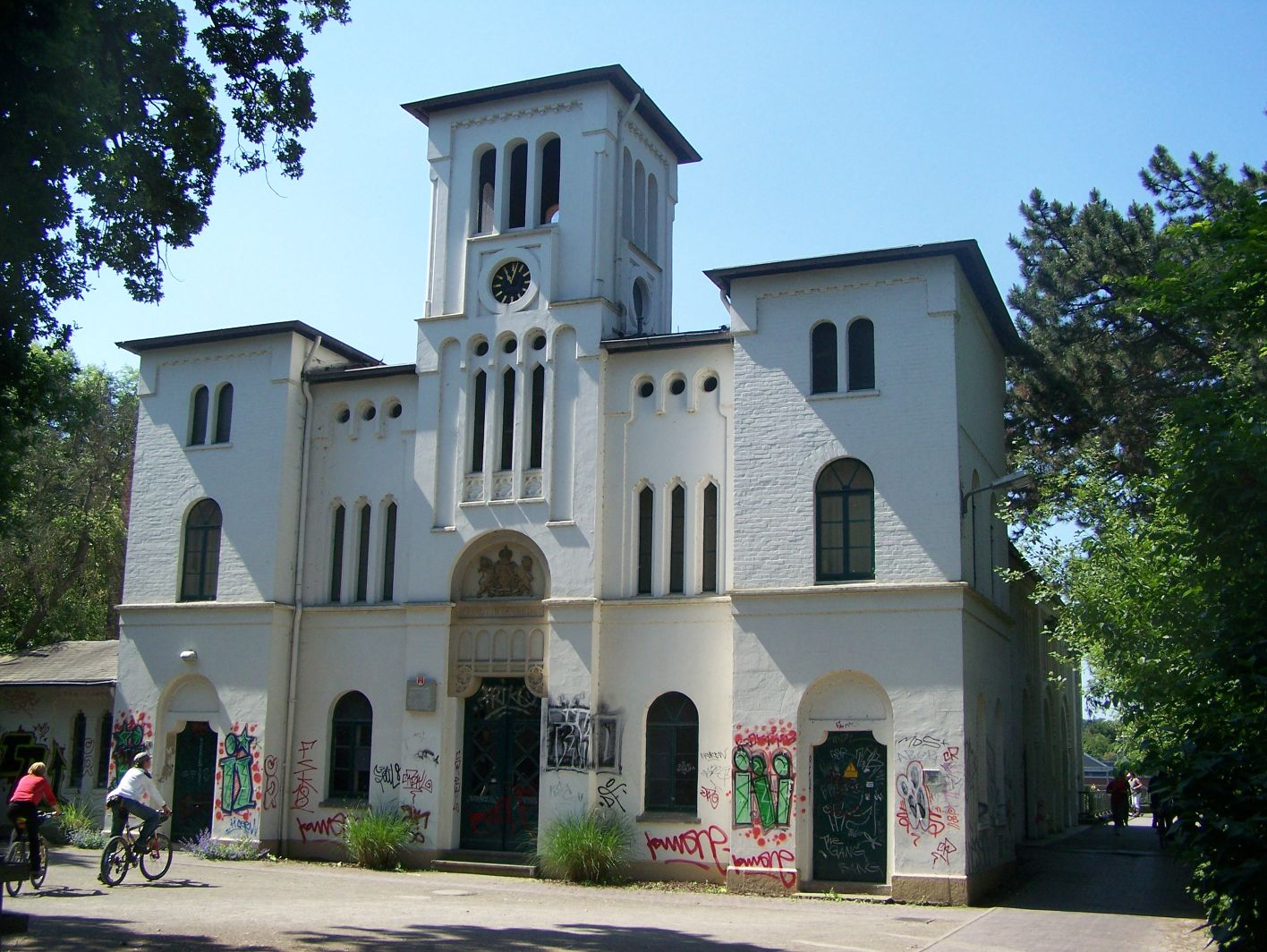 Die Wasserkunst in Hannover